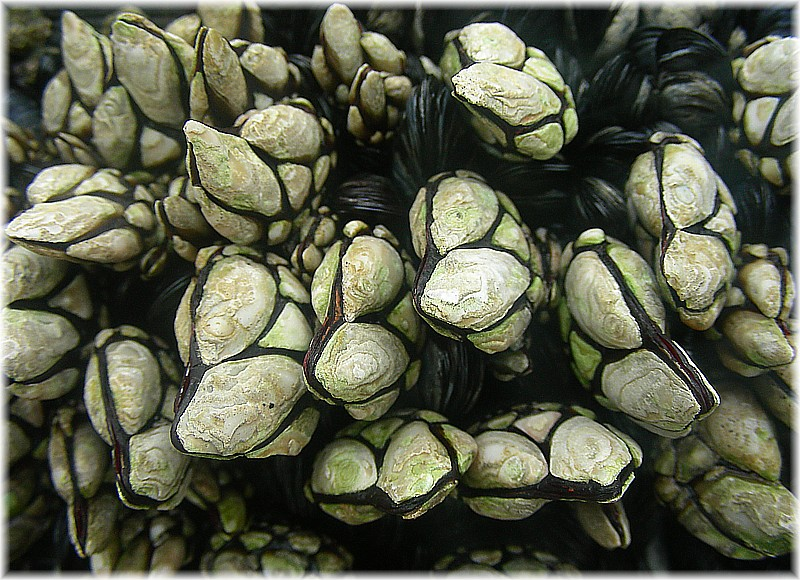 Pollicipes pollicipes, Percebes de Galicia (Spain)